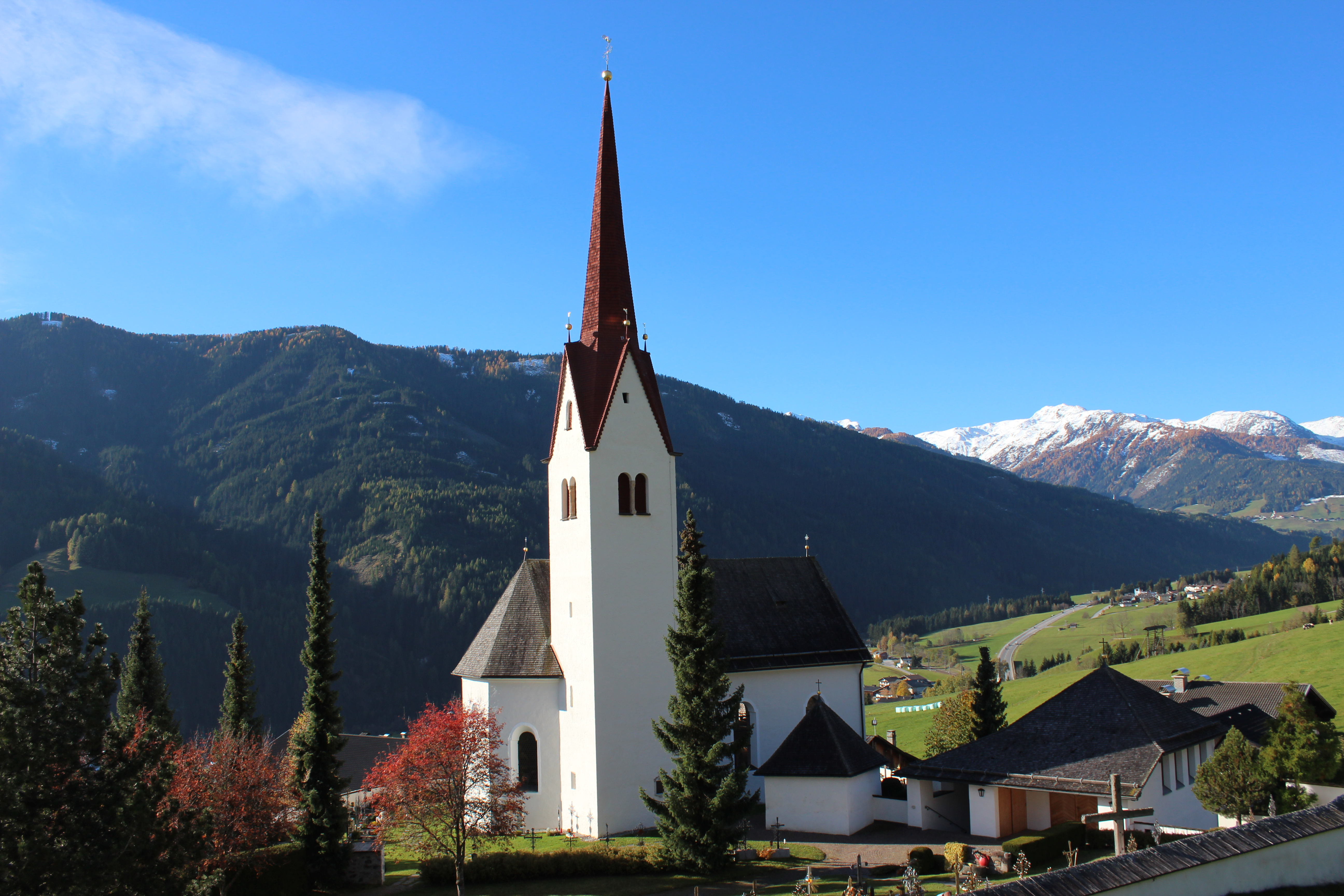 Kath. Pfarrkirche hl. Andreas in Abfaltern, Gemeinde Abfaltersbach in Osttirol, Österreich.